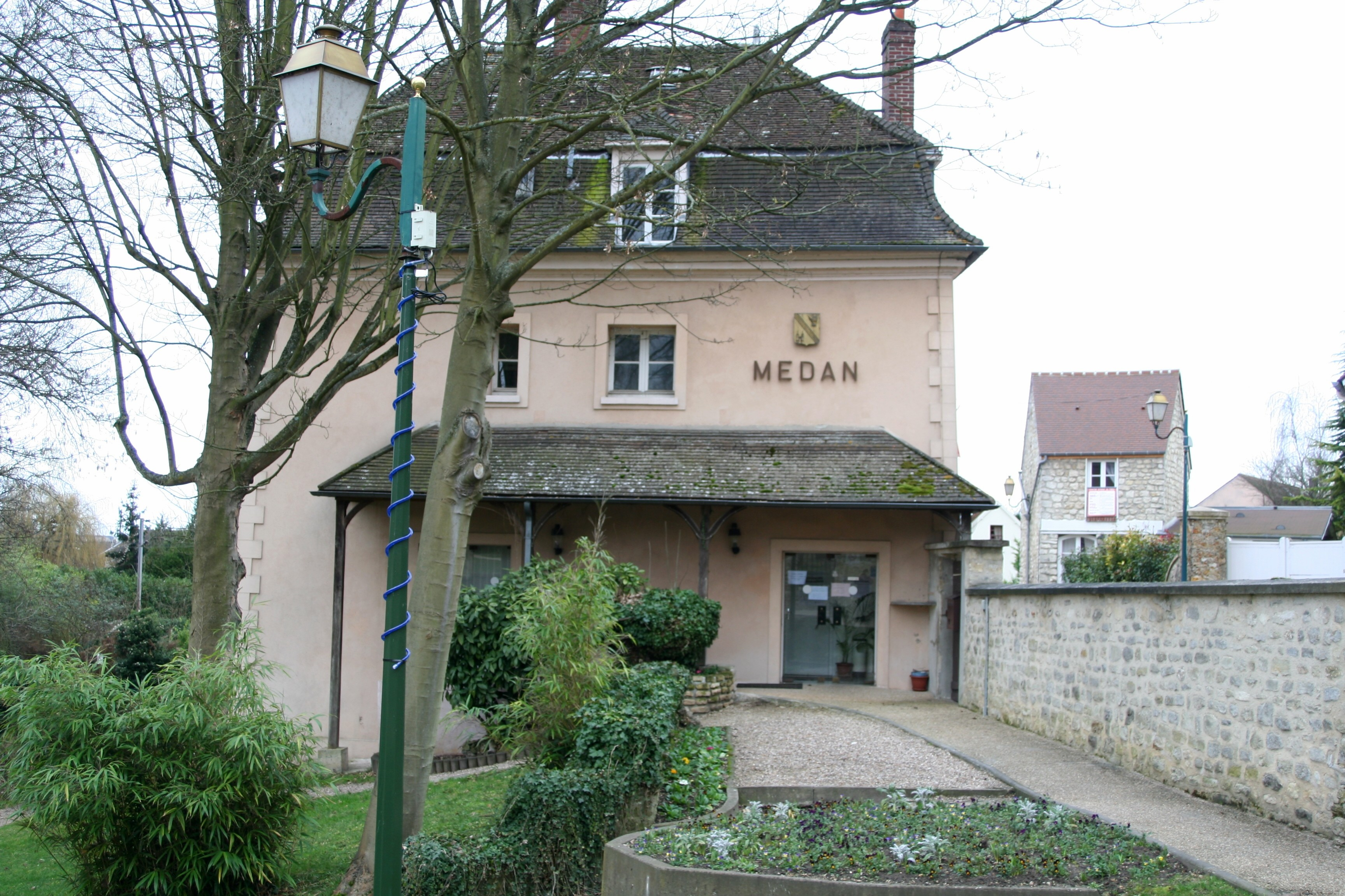 Mairie de Médan - Yvelines (France).